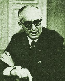 Es una foto del presidente Arturo Frondizi, en su plena presidencia, por mediados del año 1958.